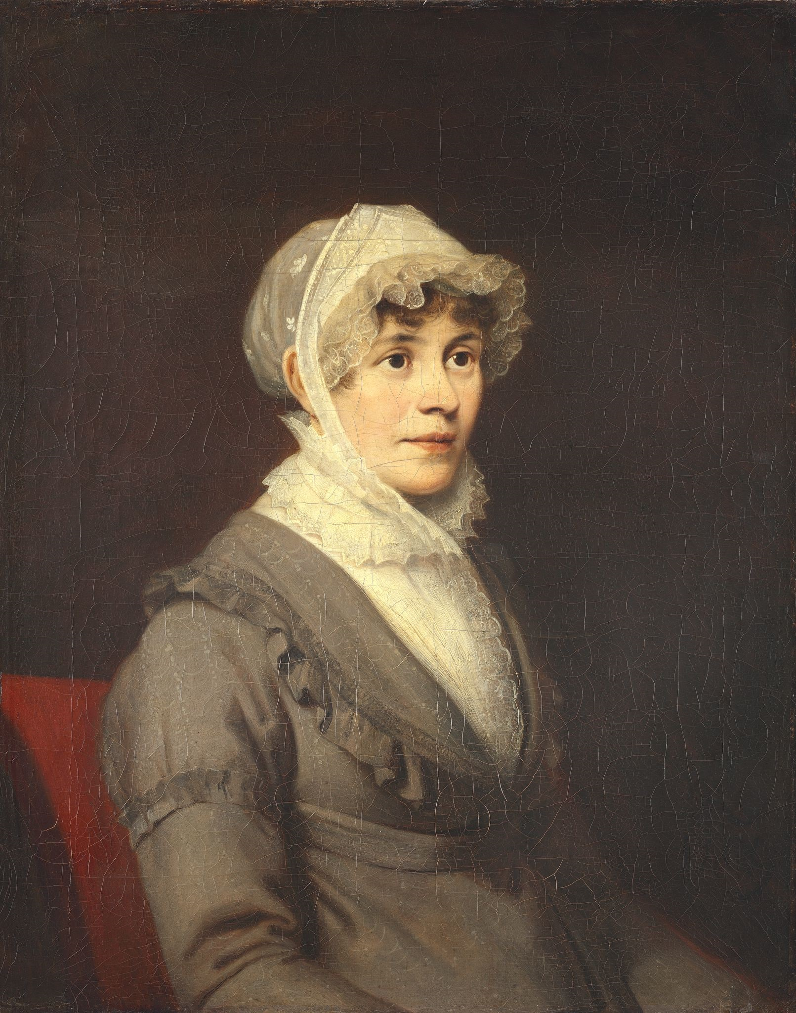 Ростопчина Екатерина Петровна (1775–1859), супруга Ф.В.Ростопчина. В 1806 под влиянием посланника королевства Сардиния графа Жозефа де Местра перешла в католичество. Остаток жизни провела затворницей в селе Вороново и в Москве. Была настроена мистически и равнодушна к светской жизни. За тихий нрав и скромный вид гости дома часто принимали ее за служанку. Ростопчина изображена почти аскетично, в костюме, который она не меняла до самой смерти. Фигура кажется скованной, но еле заметный наклон, мечтательный и слегка беспокойный взгляд создают особое чувство дуновения жизни. Является парным к портрету Ф.В.Ростопчина.